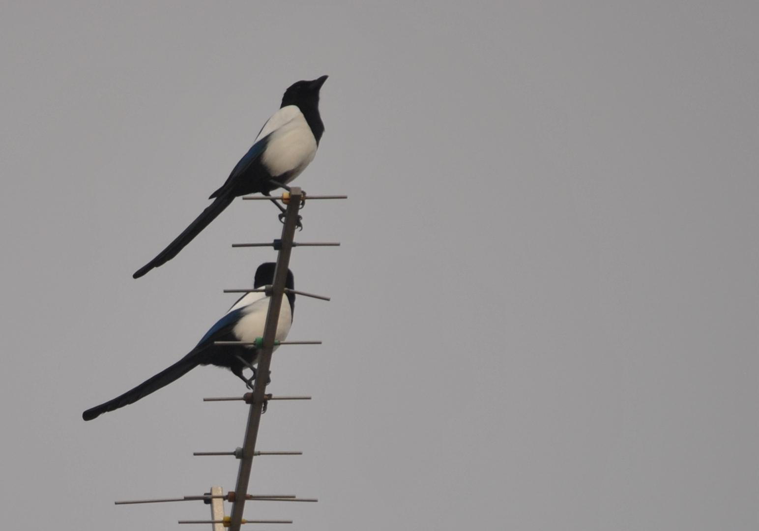 Pica pica europea, avvistata sull'Etna